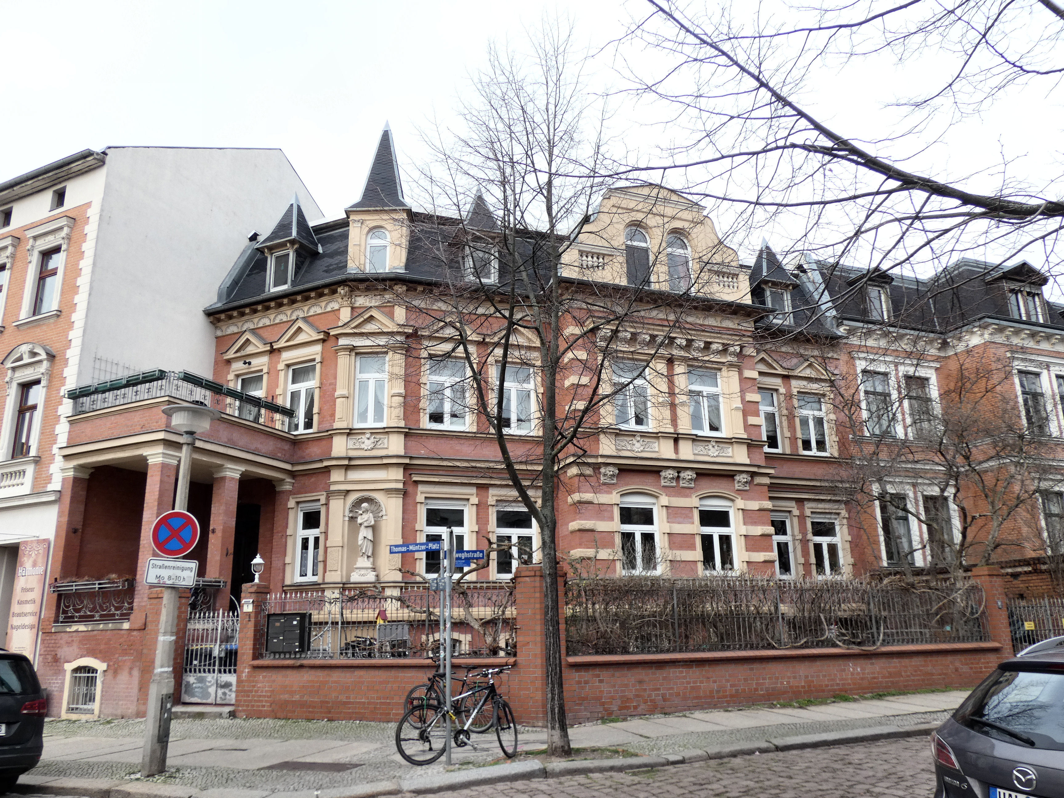 Herweghstraße 1, Halle (Saale)